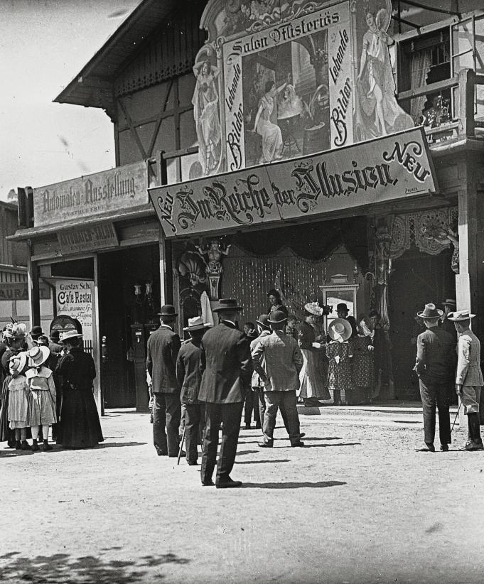 „Im Reiche der Illusion“, Wiener Prater